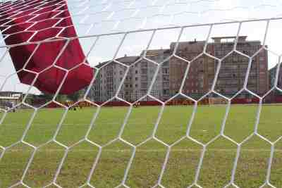 Lo Stadio Filadelfia, ripulito dalle erbacce, poco prima della partita tifosi-vecchie glorie, giocata in occasione del 46.mo anniversario della scomparsa del Grande Torino. Vista del campo da dietro la rete.